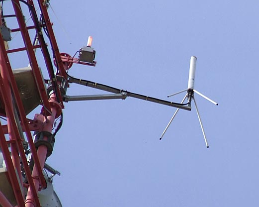 Antenne RUBIS à Taingy dans l'Yonne (89), (pylône France Télécom)